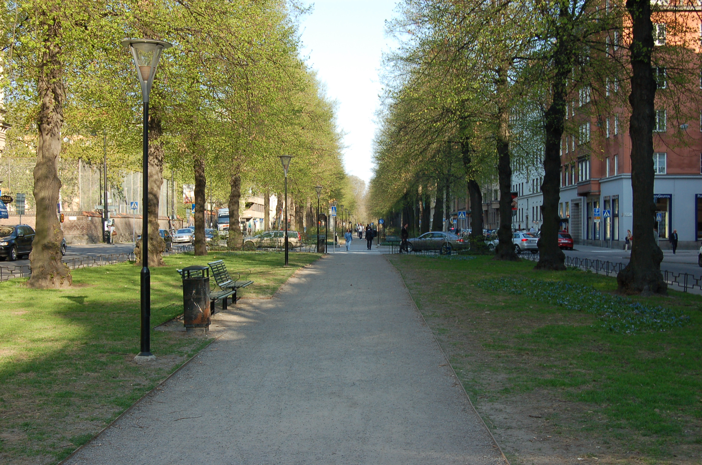 Karlavägen, Stockholm i alléen österut